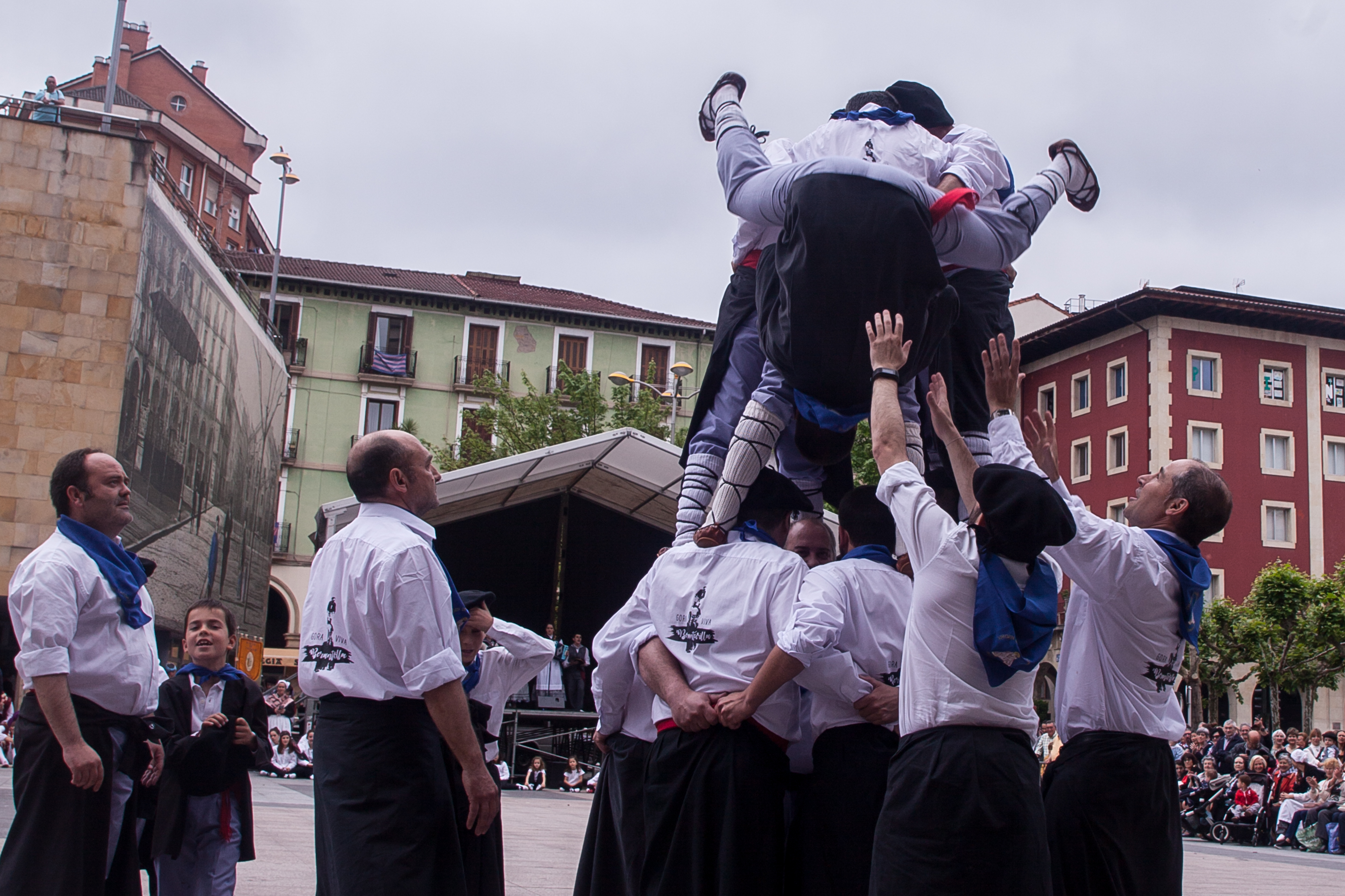 Berantevillako ohitura, bertako herritarrak, baina beste herri batean egindako ikuskizun batean (Eibarren).